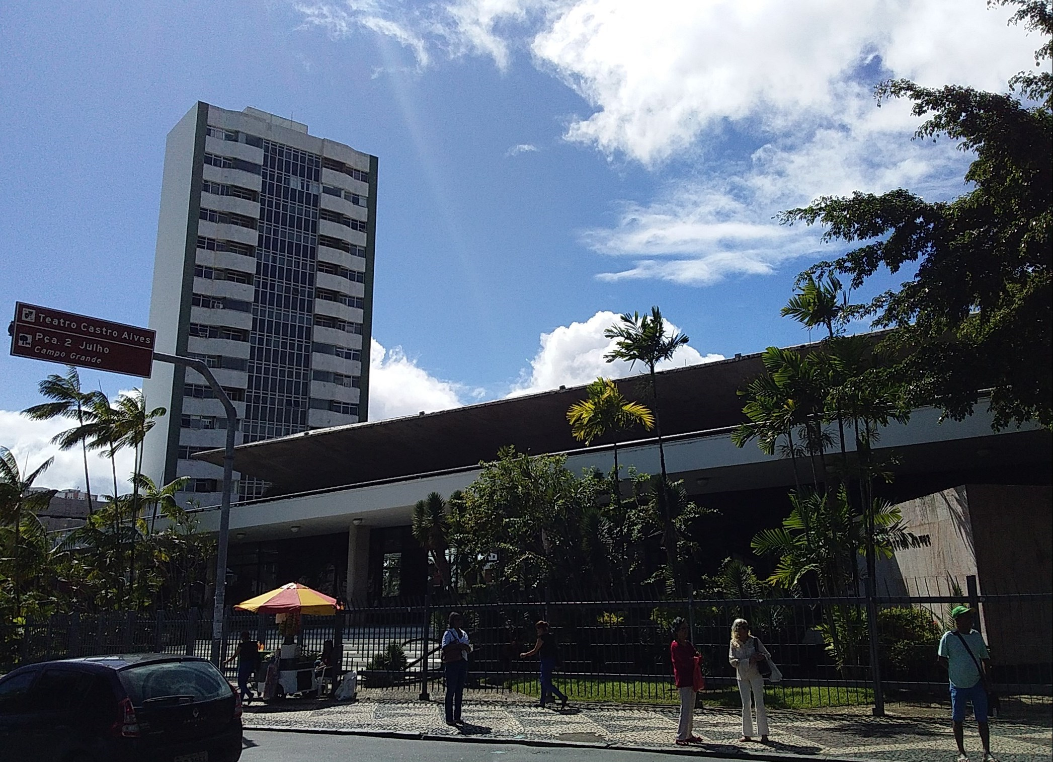 Frente do Teatro Castro Alves (TCA) fotografada no dia 26 de julho de 2019, no Largo do Campo Grande, Salvador, Bahia, Brasil.